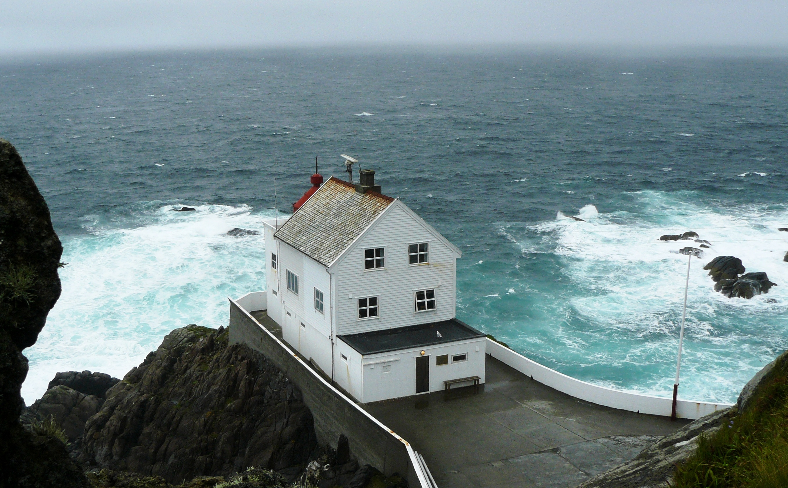 Kråkenes lighthouse on Vågsøy, Norway - 3